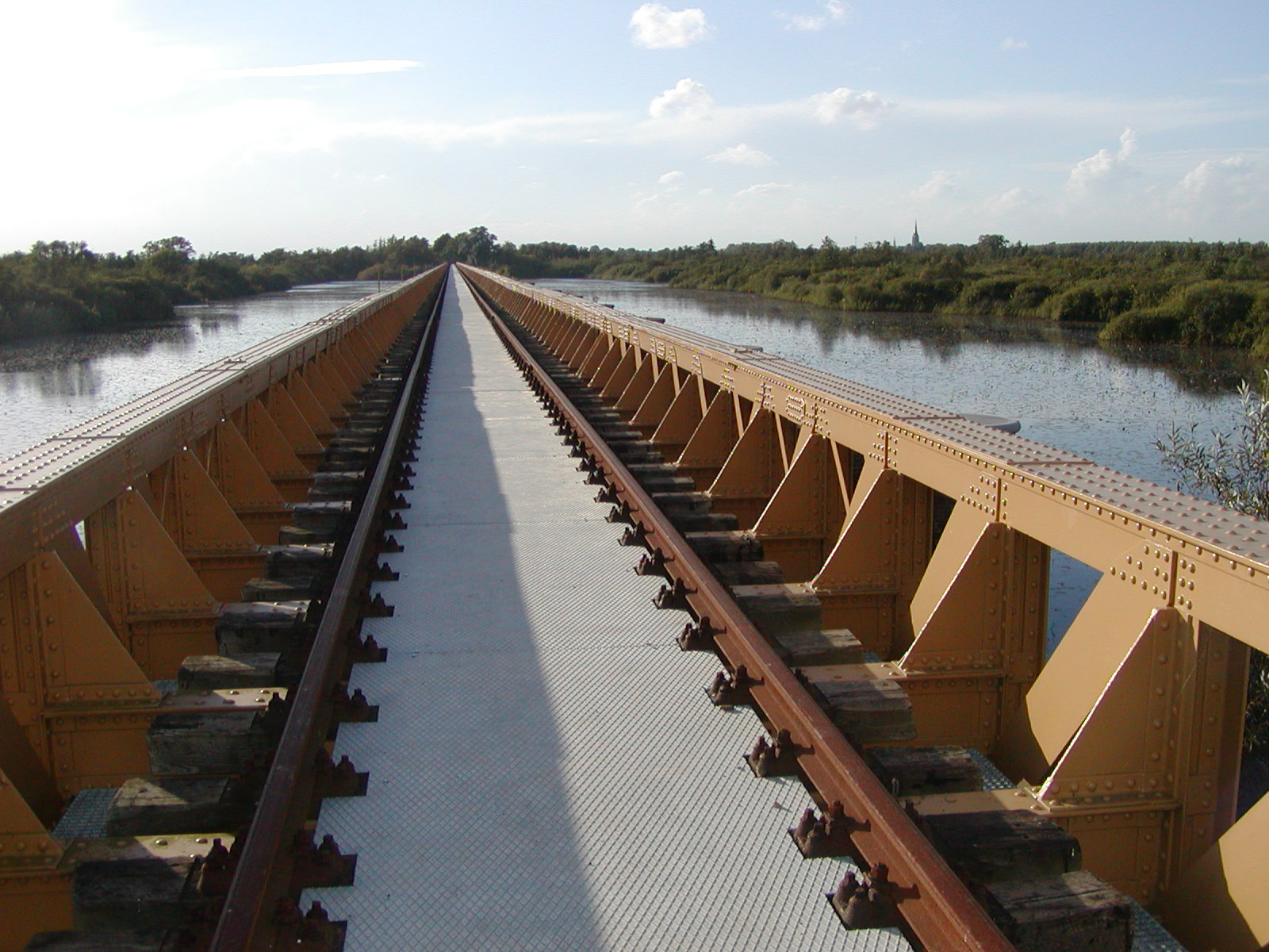 Moerputtenbrug na de restauratie